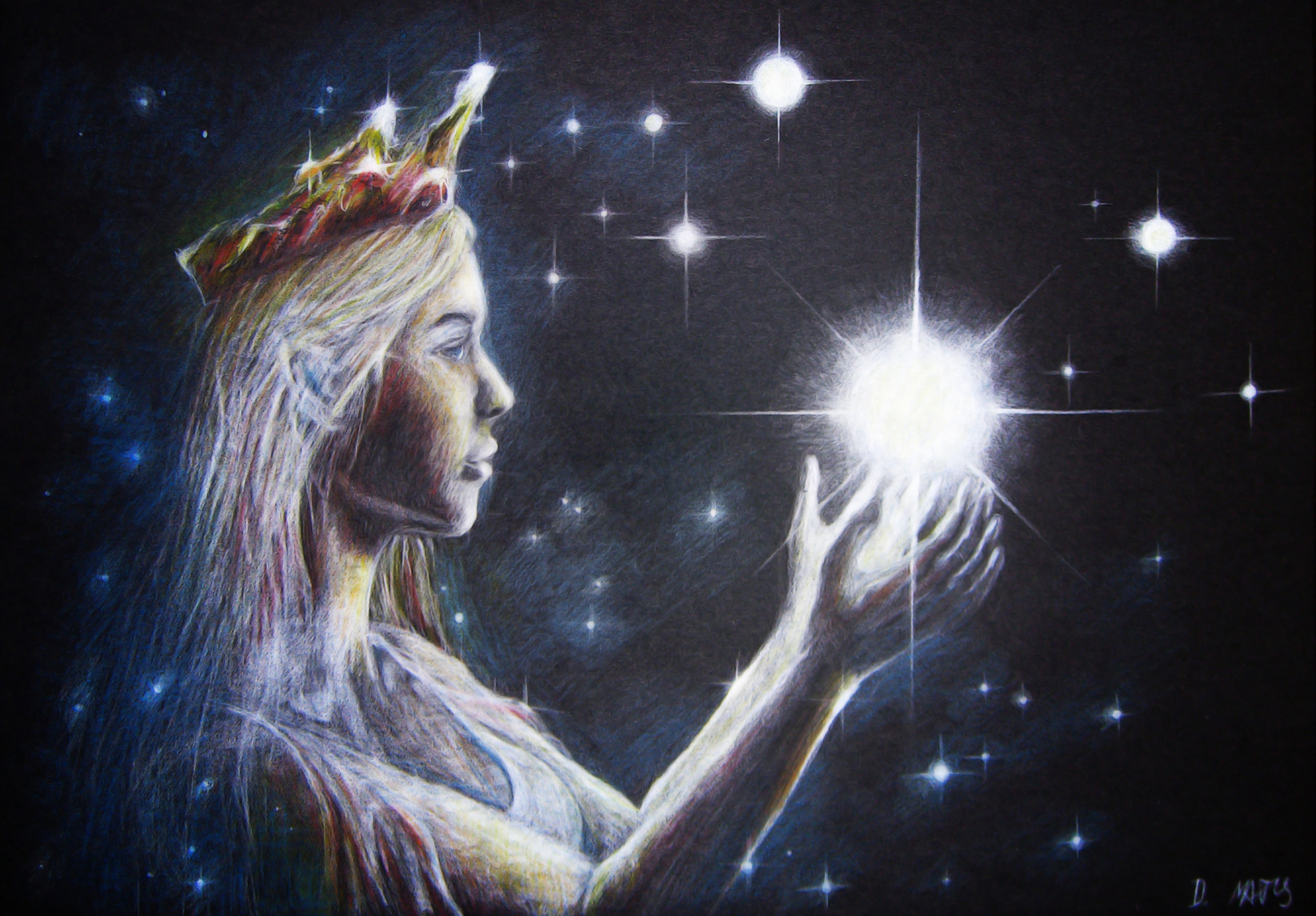 Varda Elentári, Královna hvězd